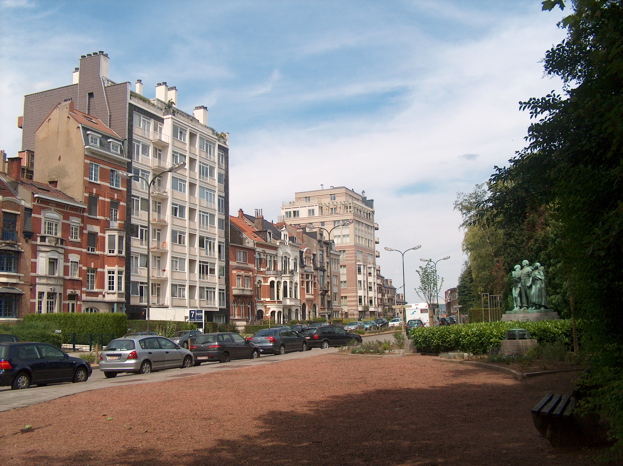 La place des Carabiniers à Schaerbeek, Bruxelles, Belgique.